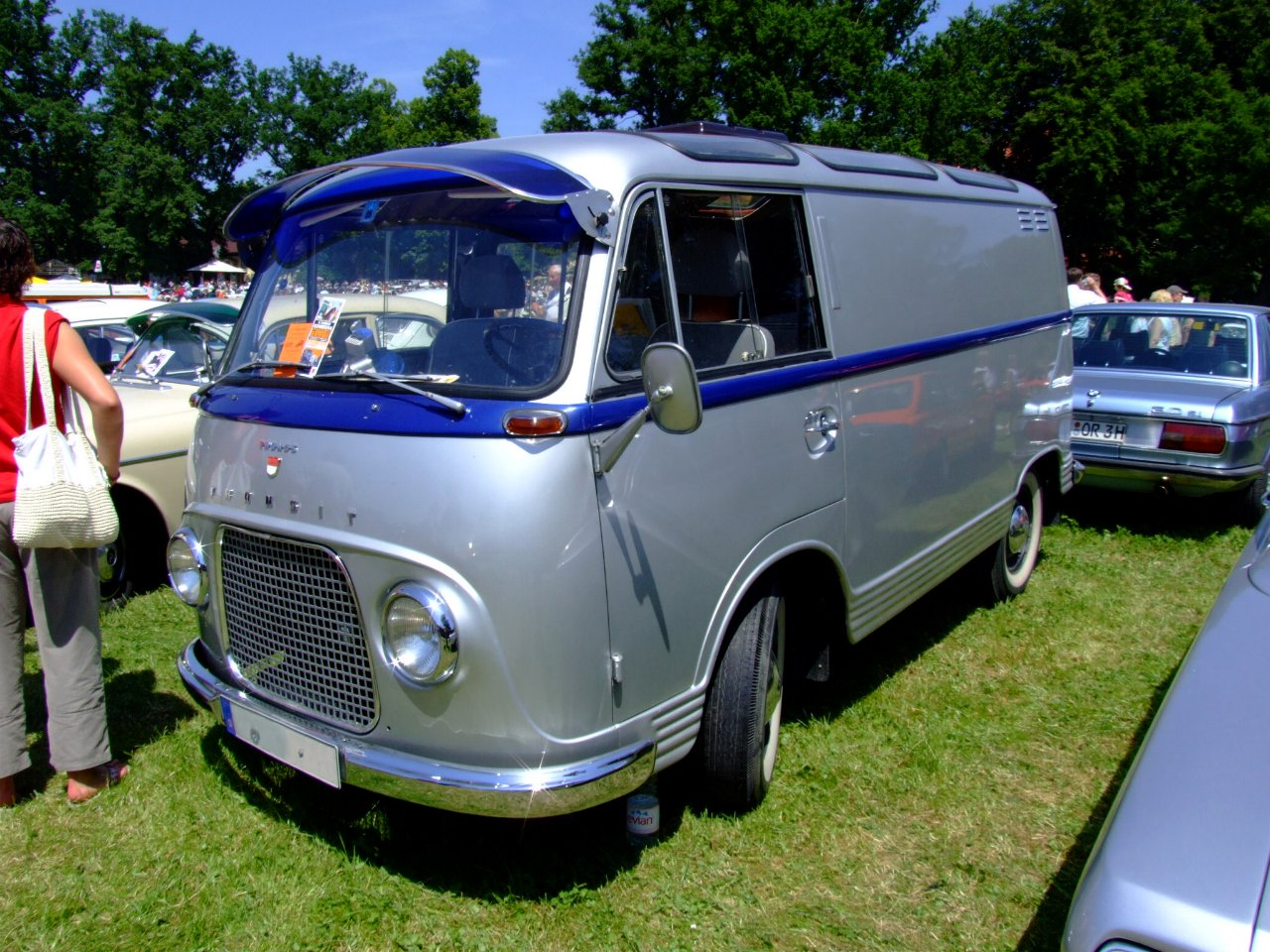 Ford Taunus Transit 1964 Baujahr: 1964 55 PS mit Ford 20M-Maschine